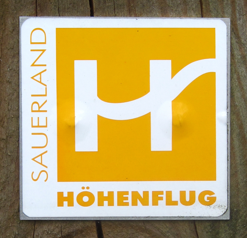 Markierungszeichen (Hauptweg) des Wanderweges Sauerland-Höhenflug in Altena.